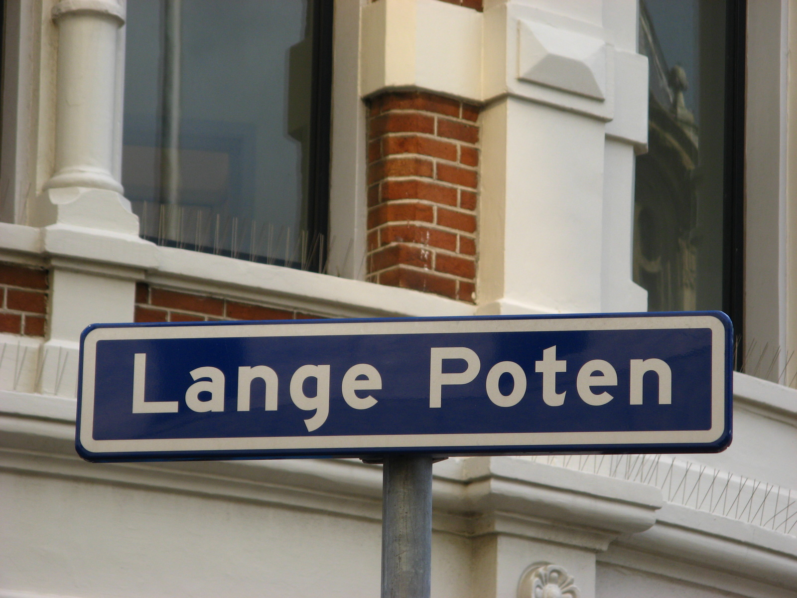 straatnaambordje Lange Poten, Den Haag